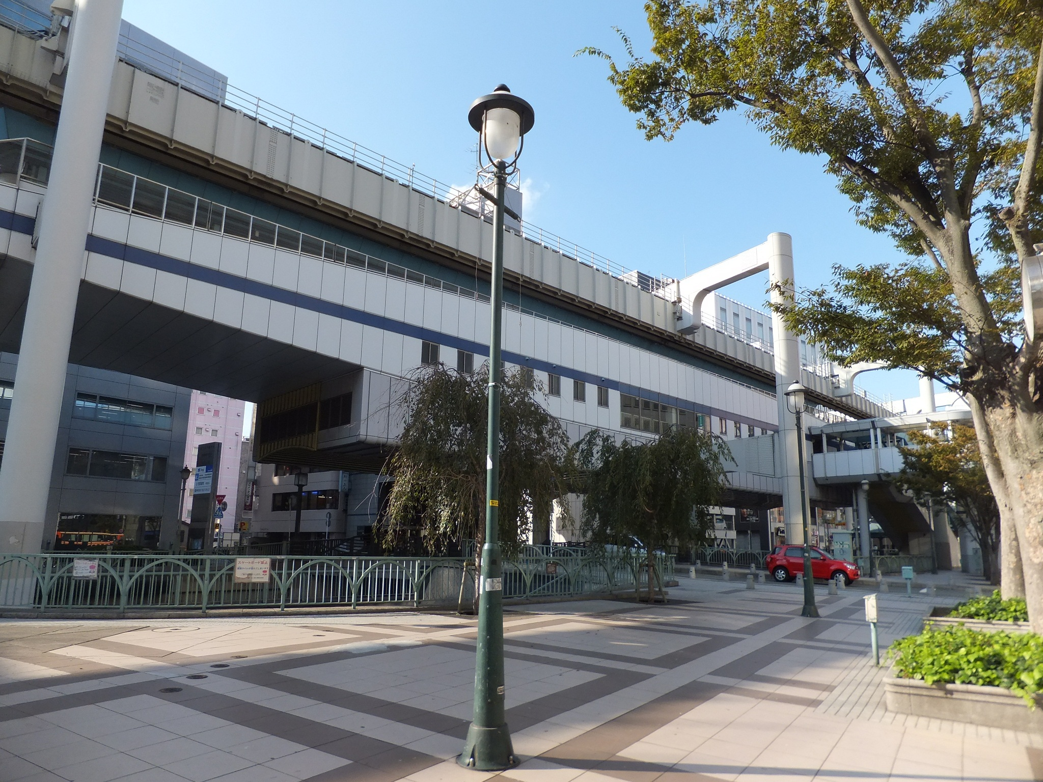 千葉都市モノレール葭川公園駅東側から